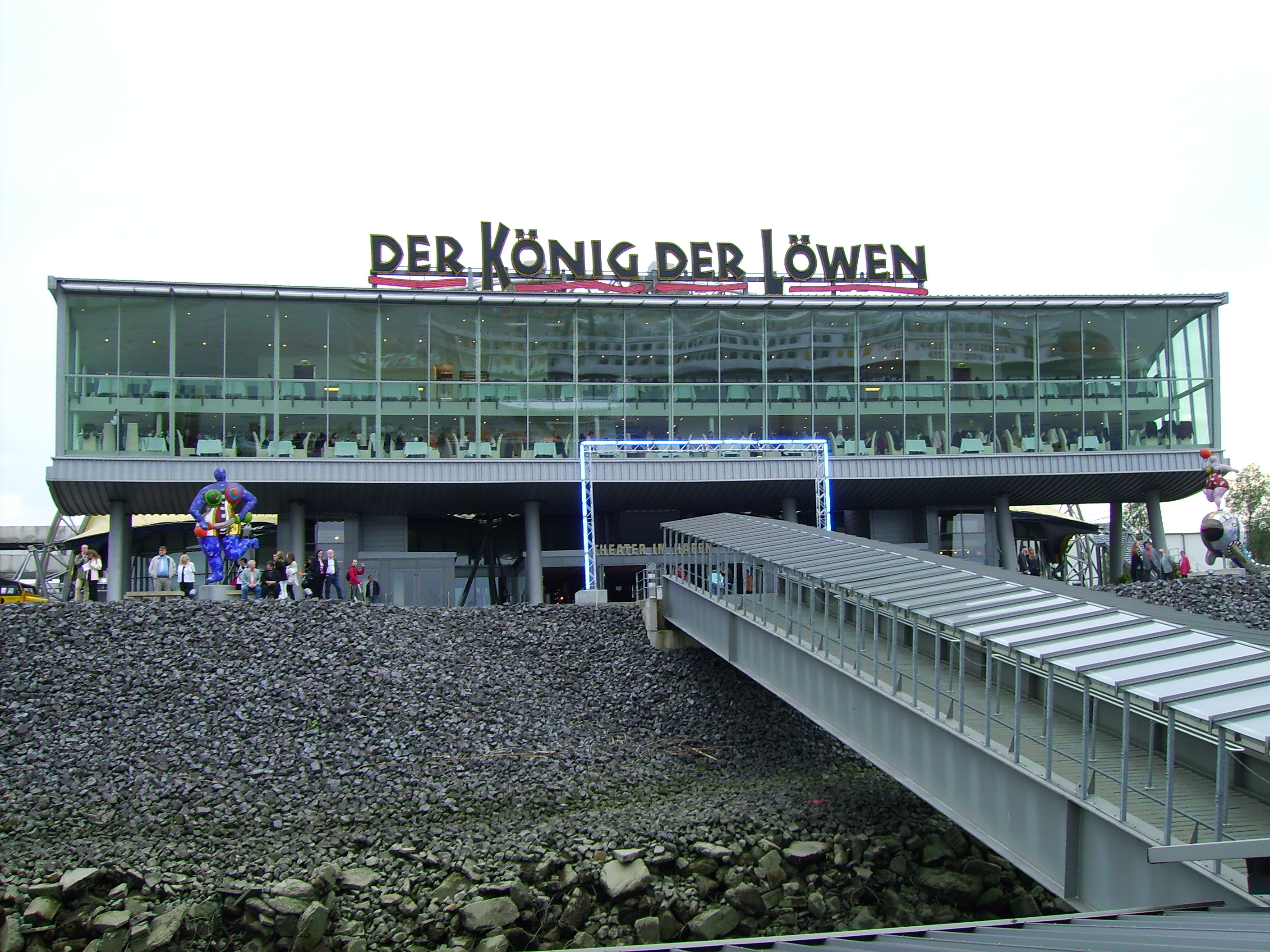 Gebäude des Muscials König der Löwen in Hamburg